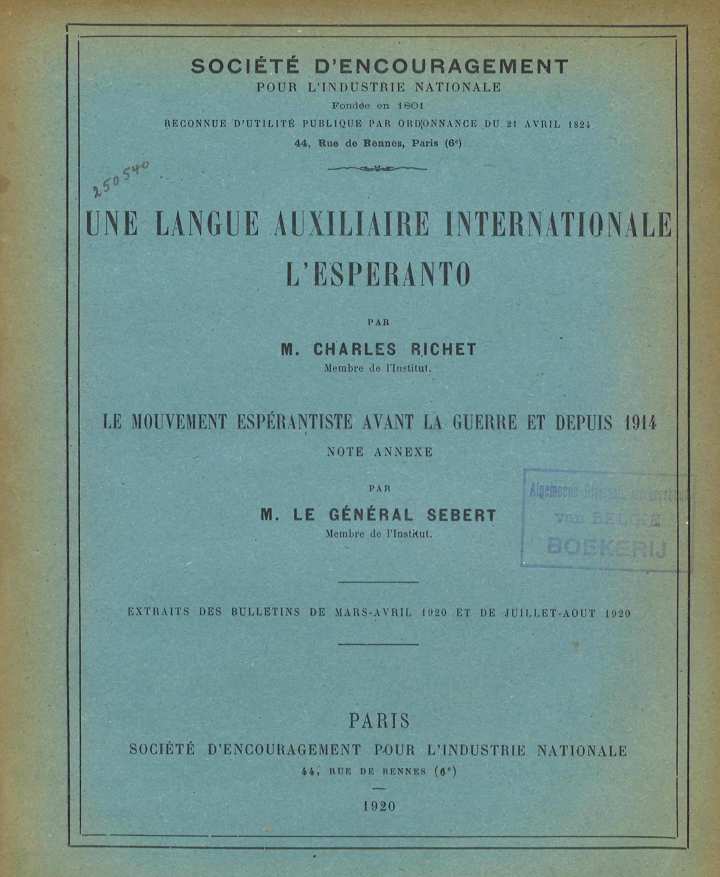 librokovrilo de "Une Langue Auxiliaire Internationale", 1920